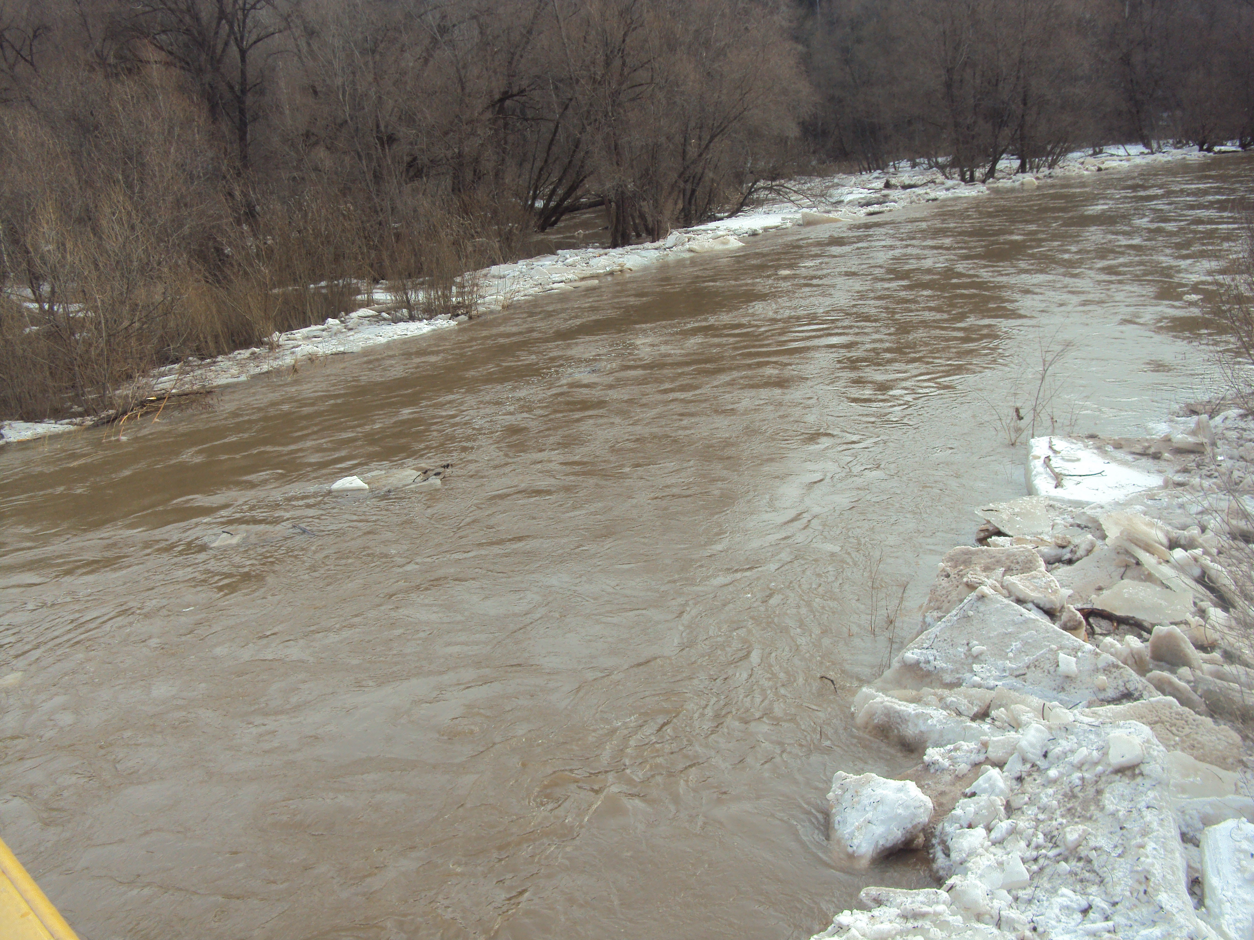 Разлив реки Шаня в районе Гиреевского моста (Износковский район)